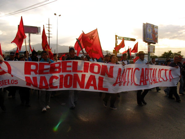 La Otra Campaña